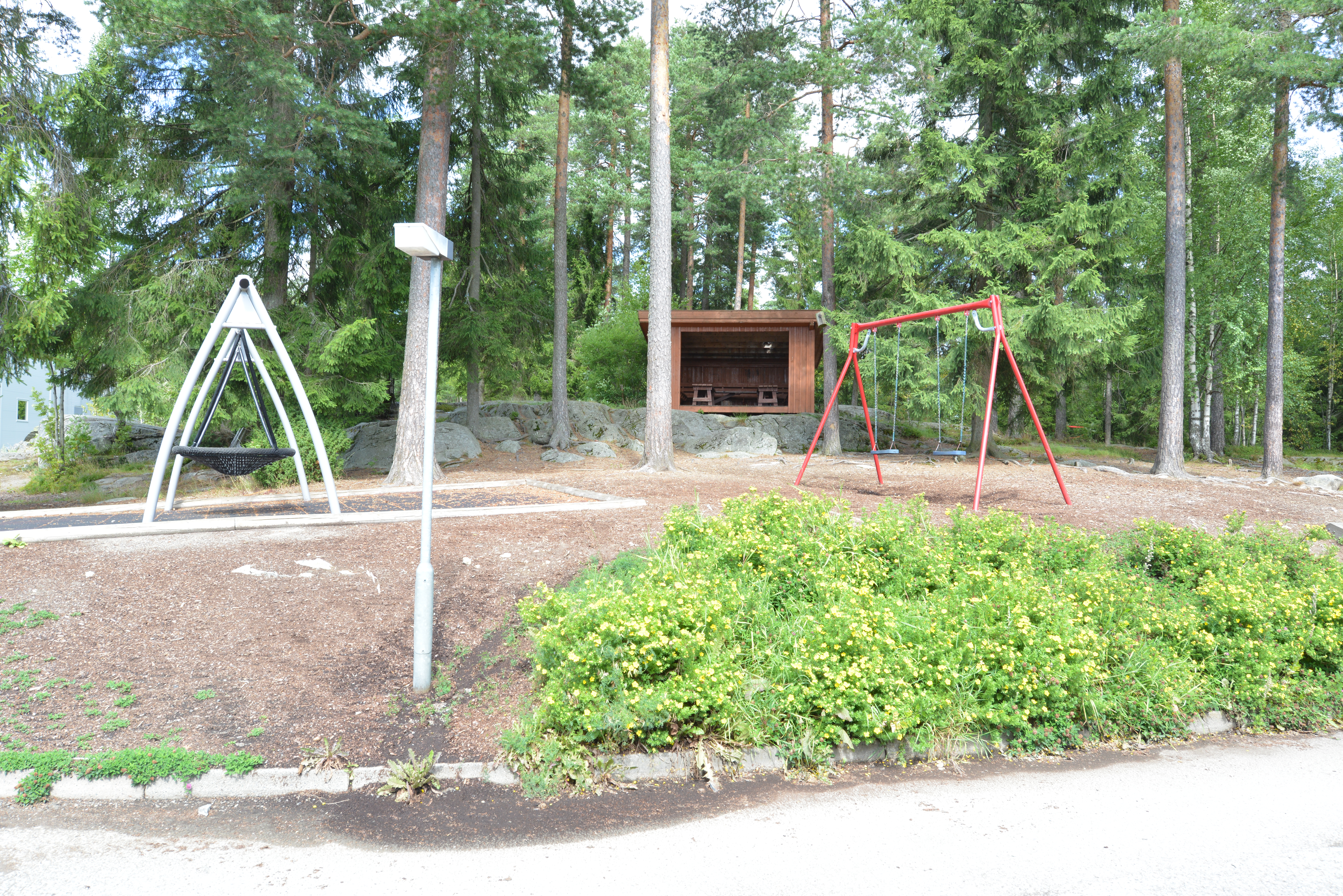 Uteområde på Borgen skole på Borgen i Ullensaker